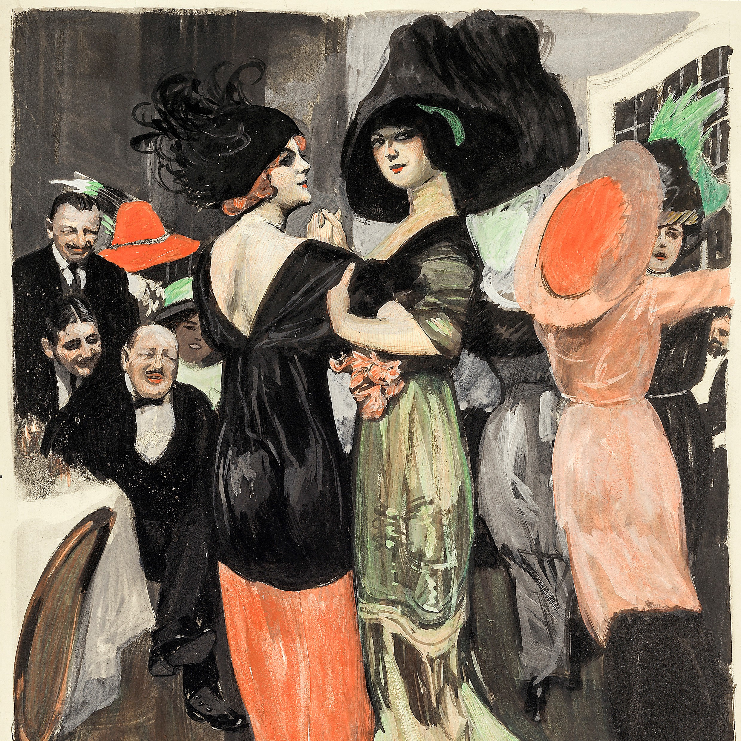 Ernst Heilemann: Berlin s'amuse. Aquarell, Tusche und Deckweiß auf Karton, 41,5 x 30 cm, rechts unten signiert